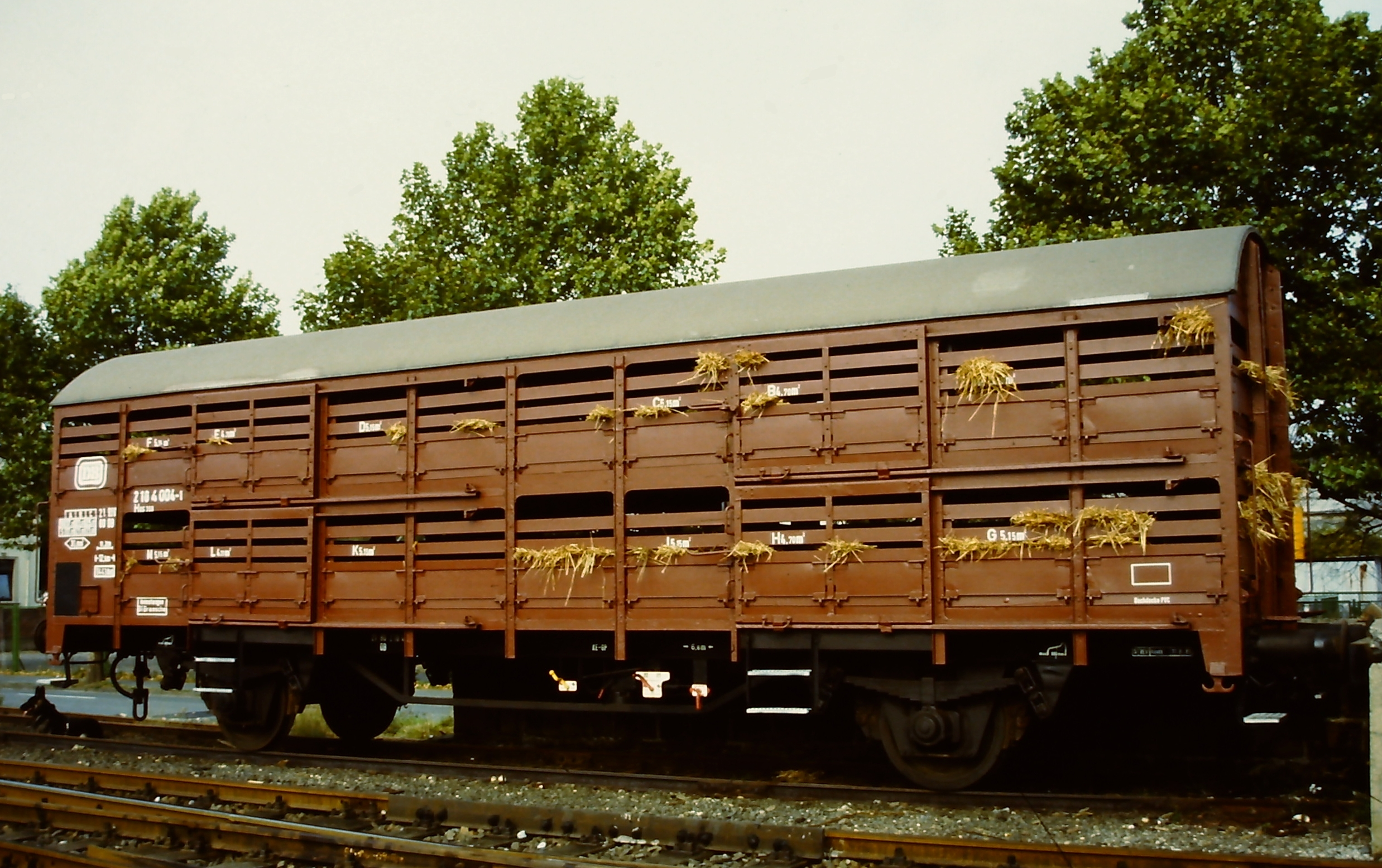 Verschlagwaggon Hes358, ausgestellt auf der Fahrzeugschau 150 Jahre deutsche Eisenbahn in Bochum-Dahlhausen